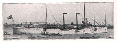 SMS Leopard